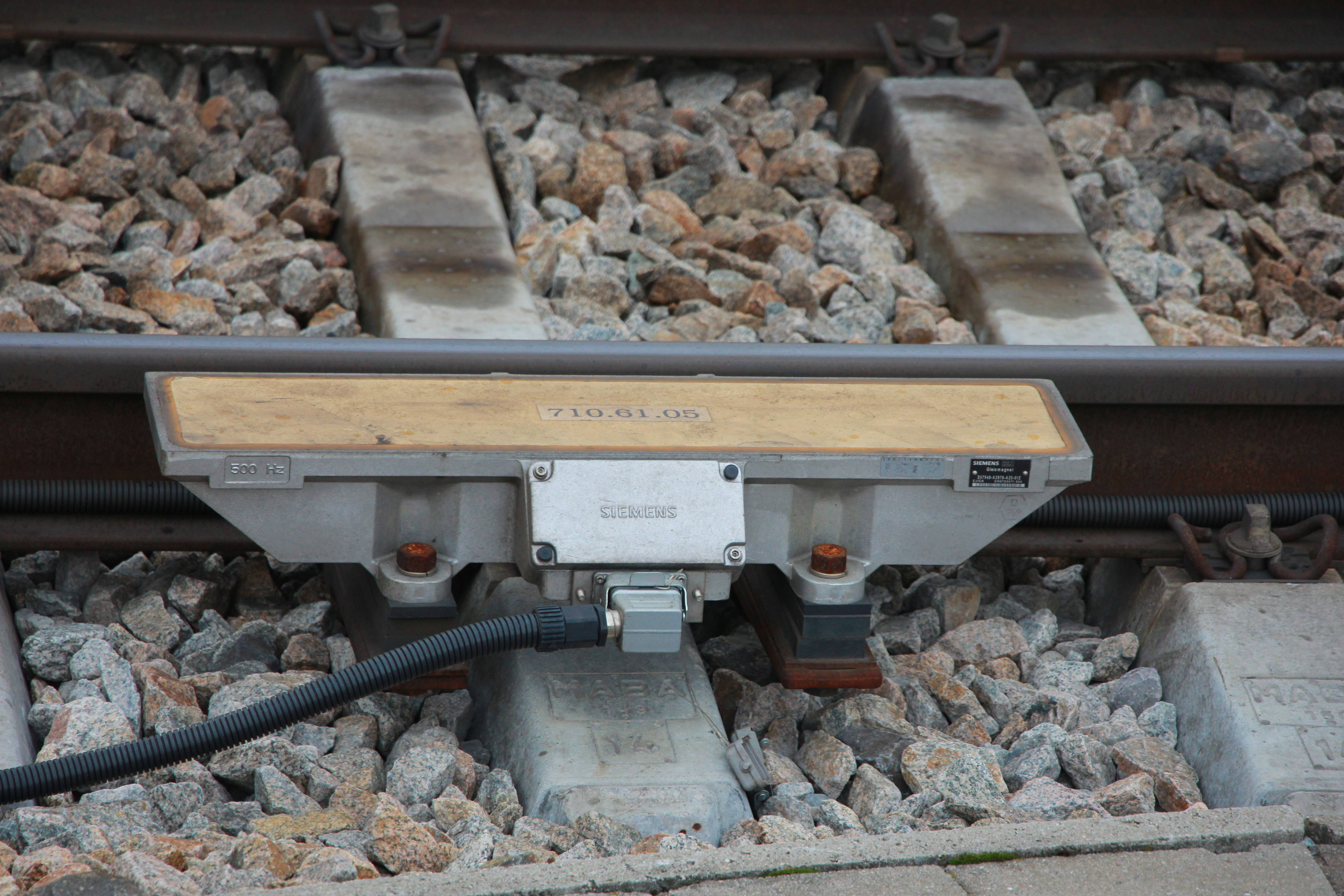 500 Hz Gleismagnet am Gleis im Bahnhof Wien Meidling